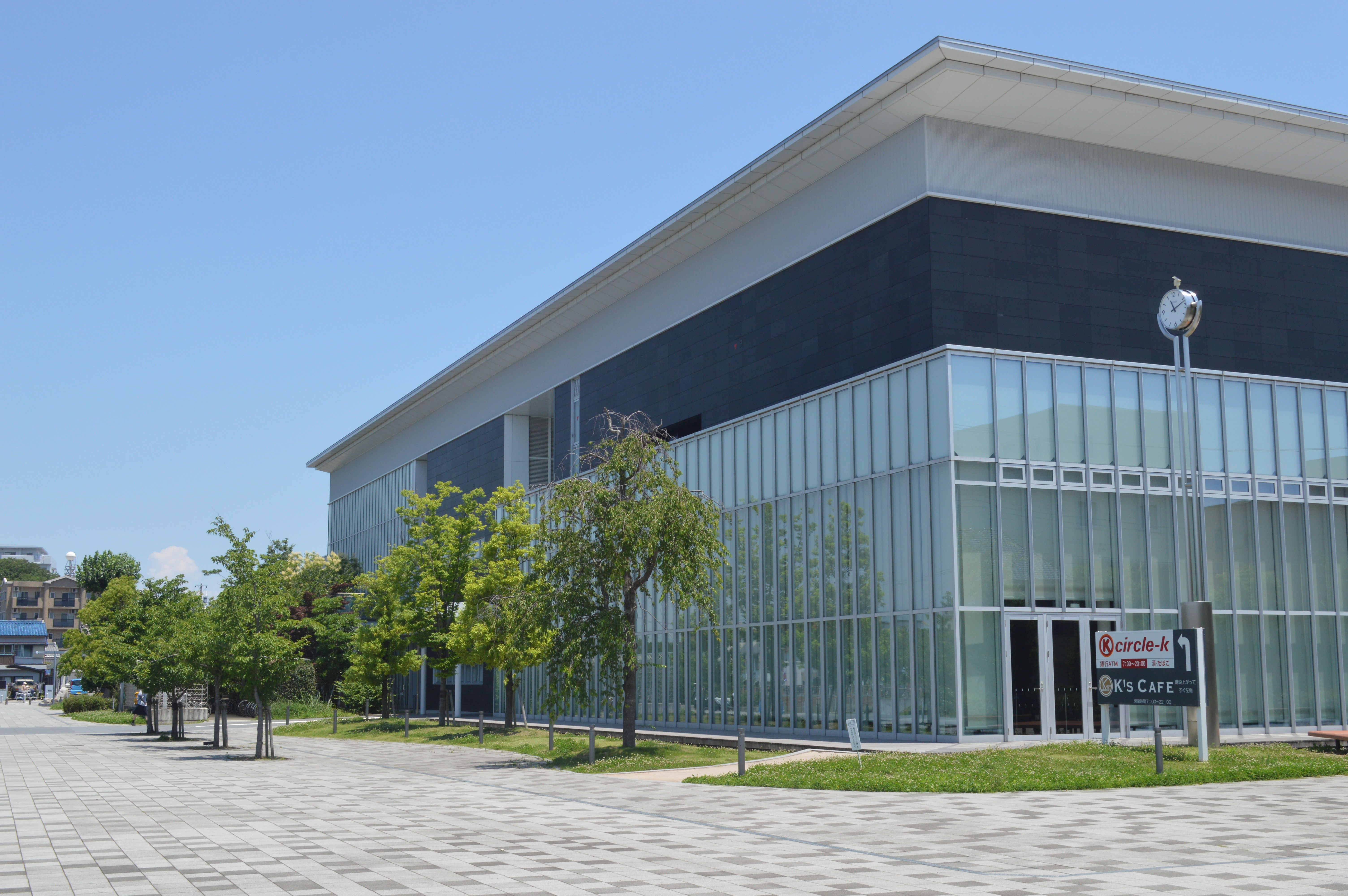 岡崎市図書館交流プラザ（岡崎市立中央図書館）。伊賀川側。